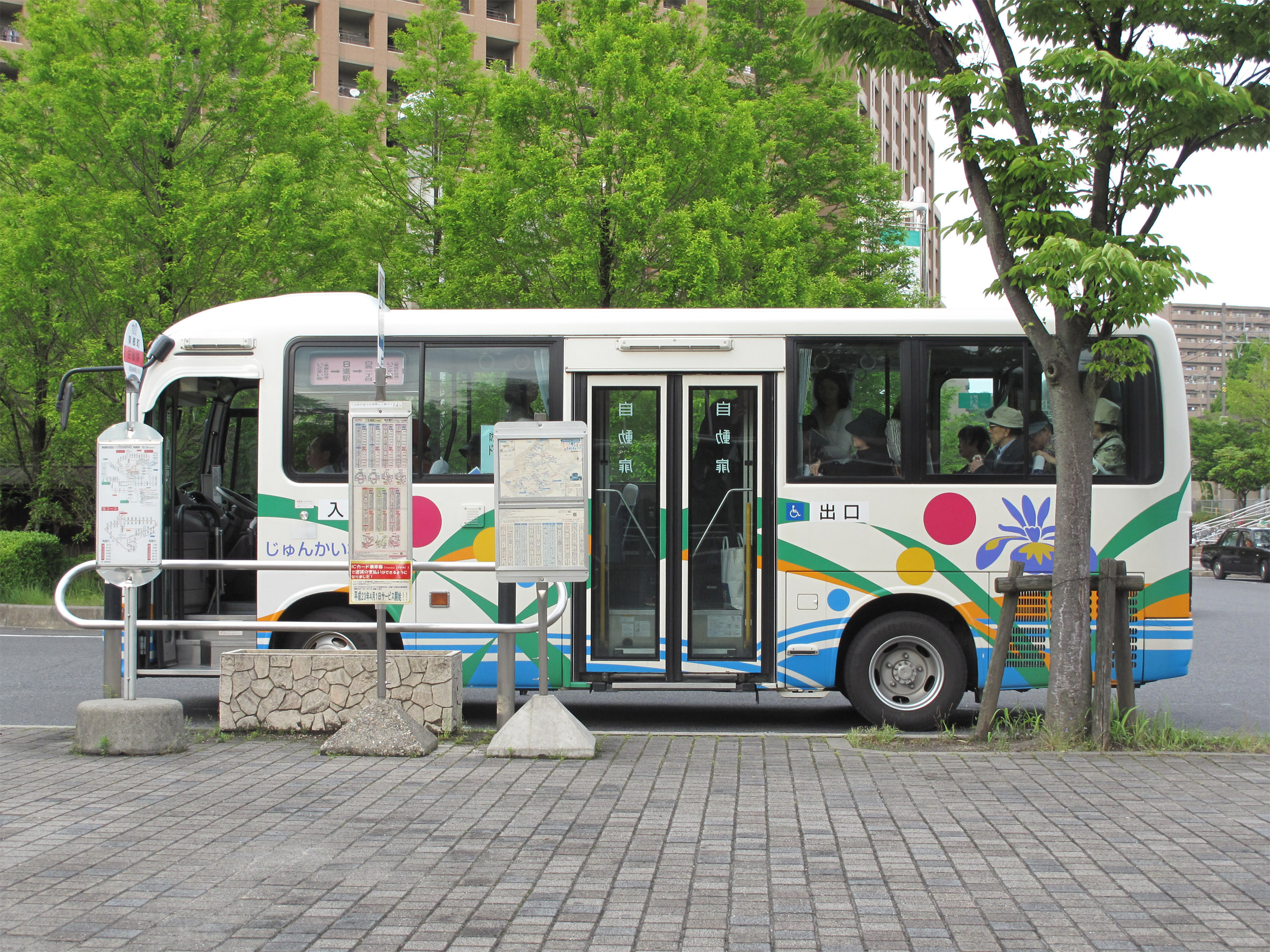 じゅんかい君 名鉄日進駅にて